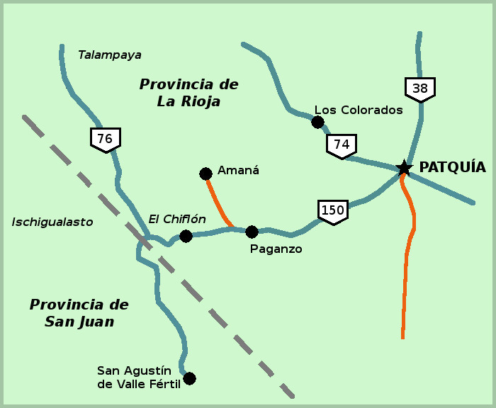 Patquía y localidades cercanas, en el departamento Independencia, Provincia de La Rioja, Argentina